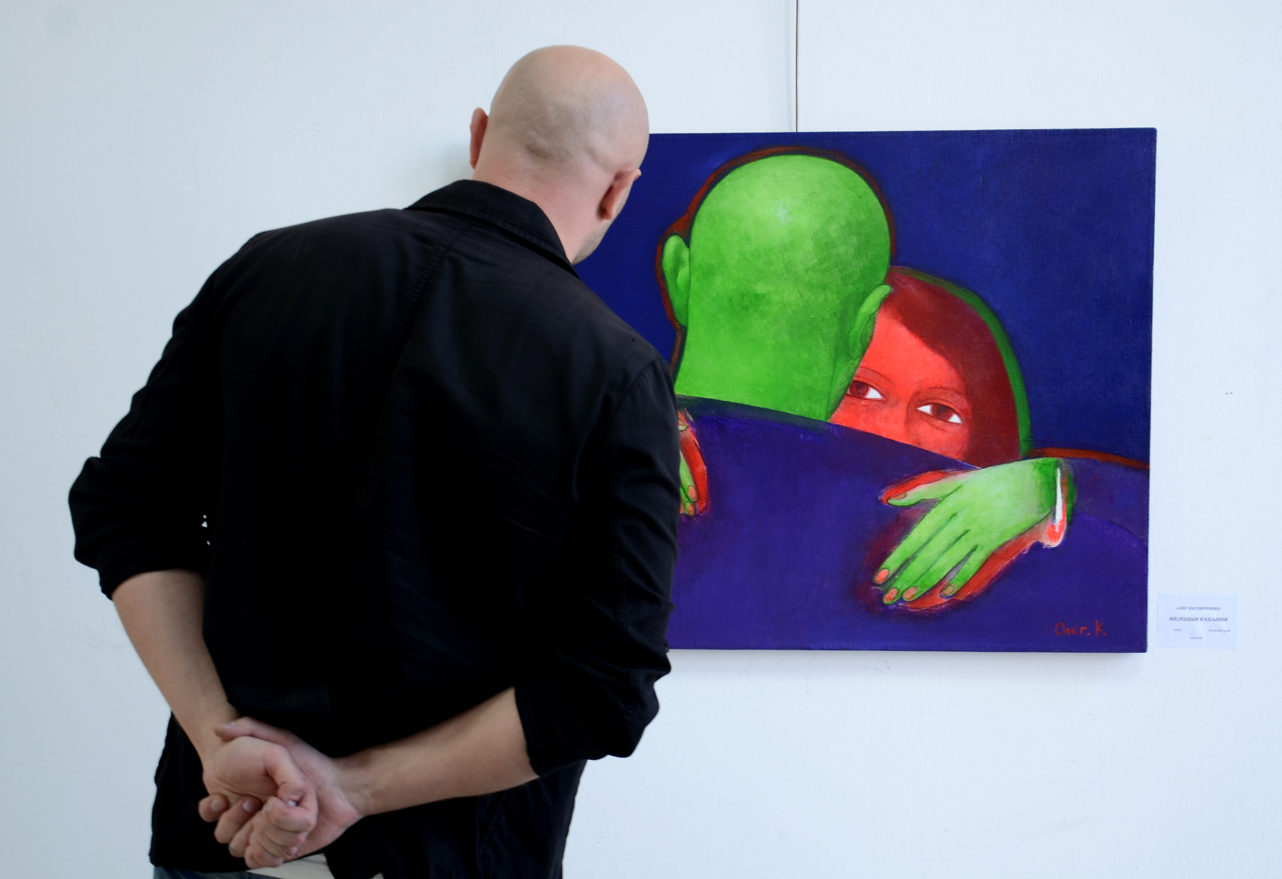 Открытие выставки живописи "Лабиринт" в минском Дворце искусств 23 апреля 2014 года. Белорусский художник Олег Костюченко рядом со своей картиной.